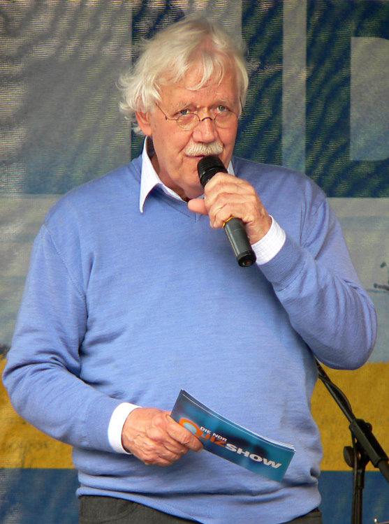 Carlo von Tiedemann